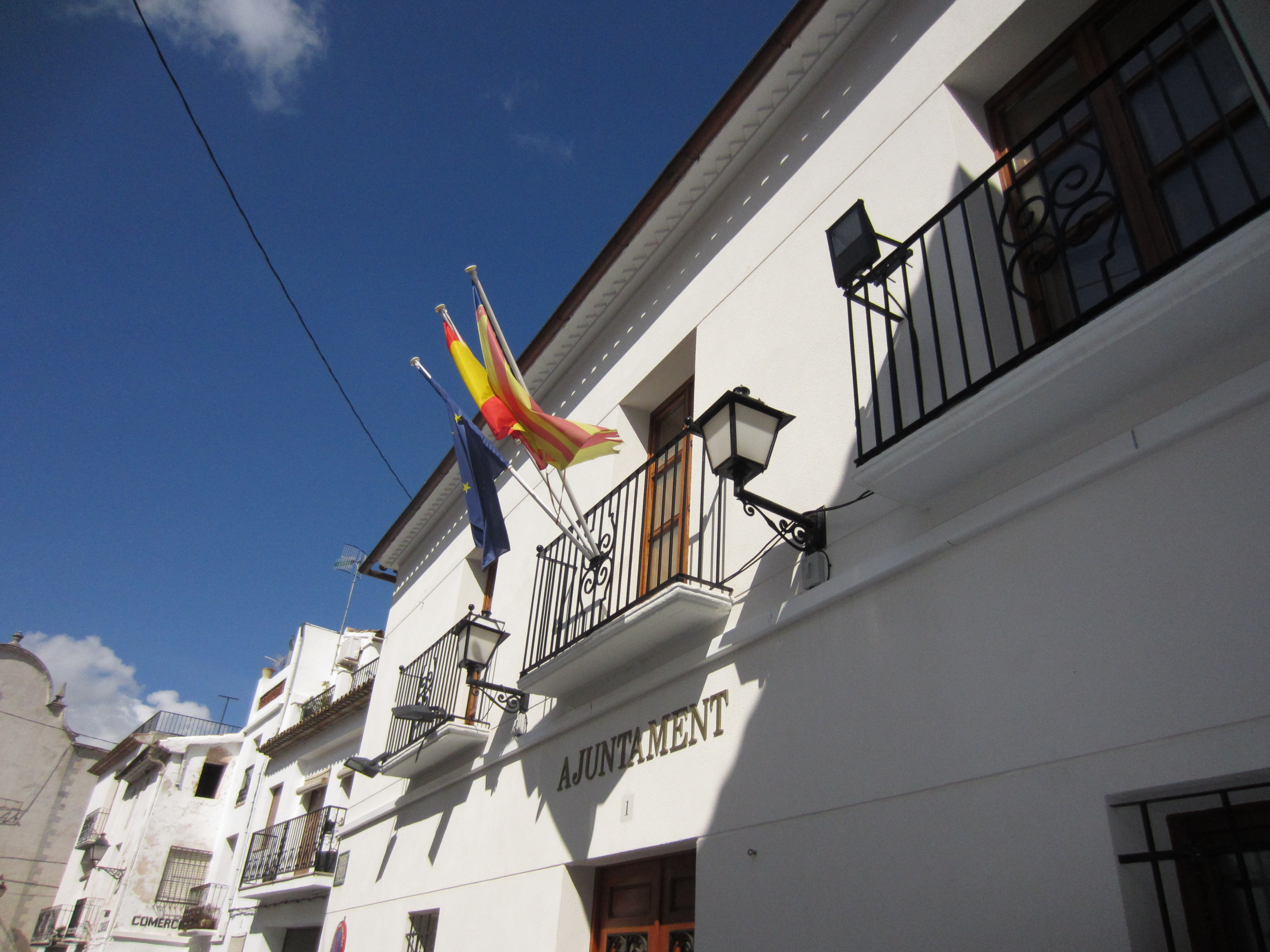 Ayuntamiento de Benimantell (provincia de Alicante)